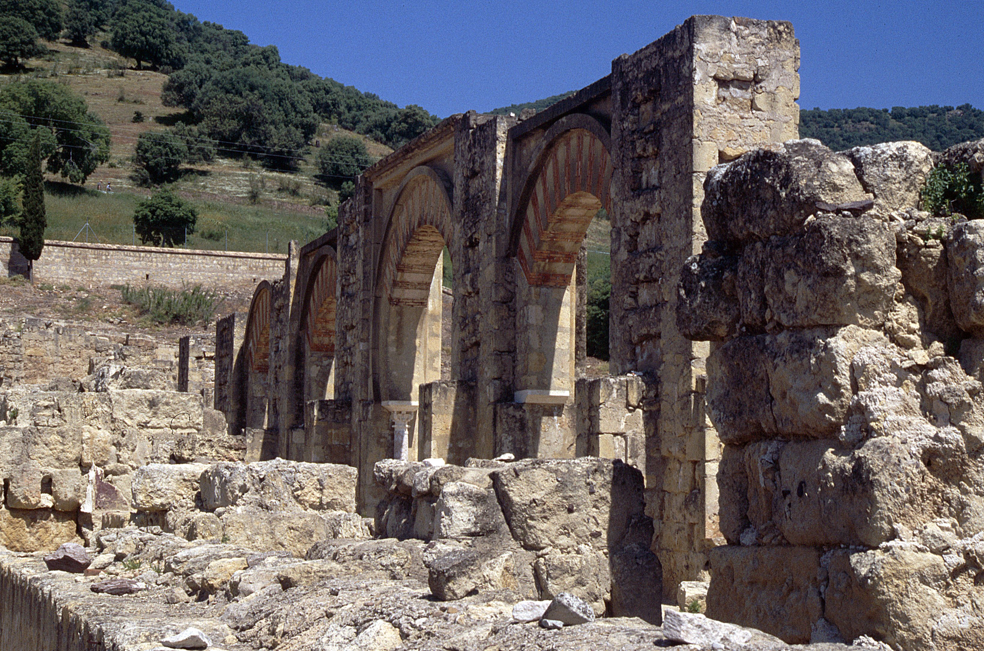 Córdoba, Medina Azahara: Pórtico del alcázar